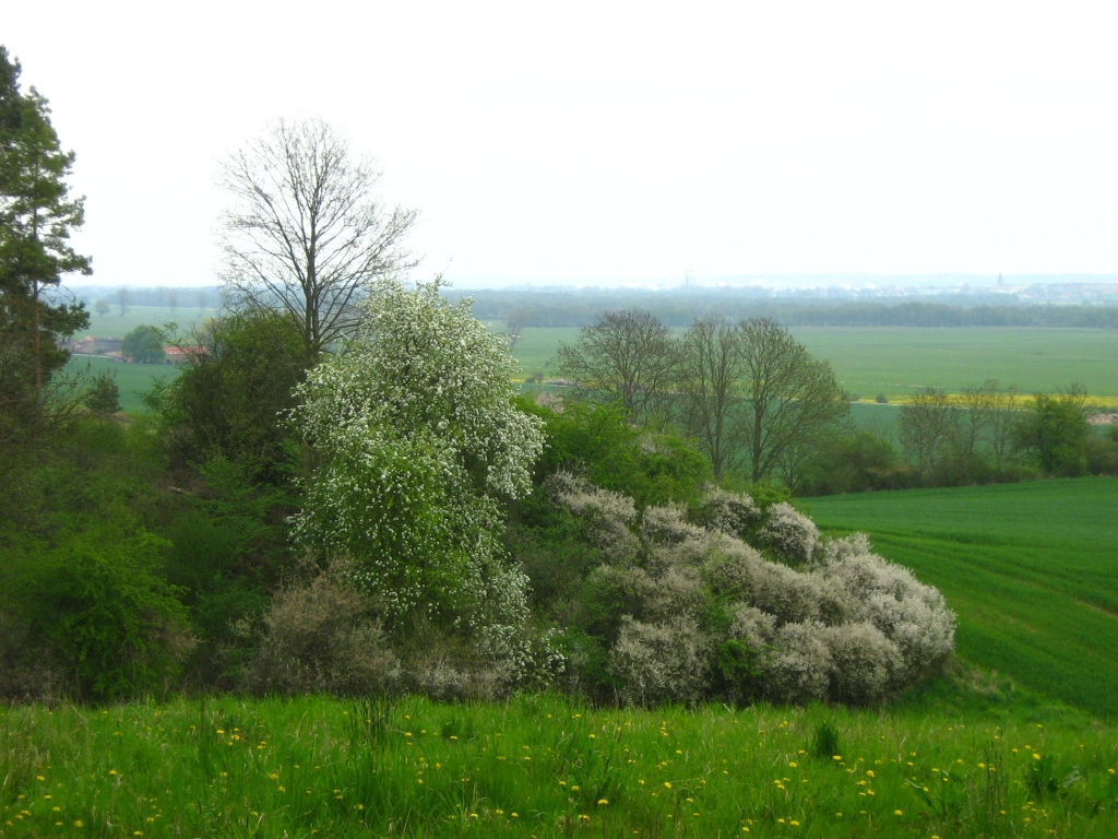 Östlicher Abhang der Mecklenburger Schweiz beim Panstorfer Forst zum breiten Stromtal der Westpeene (mit dem heutigen Dahmer Kanal) mit blühendem Schlehdorn und Frühblühender Traubenkirsche.